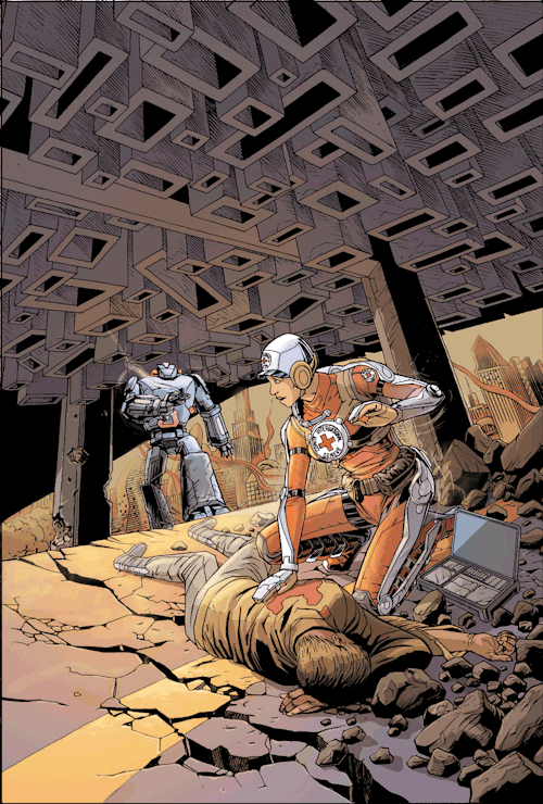 Illustration action humanitaire Red Cross Red Crescent 2065